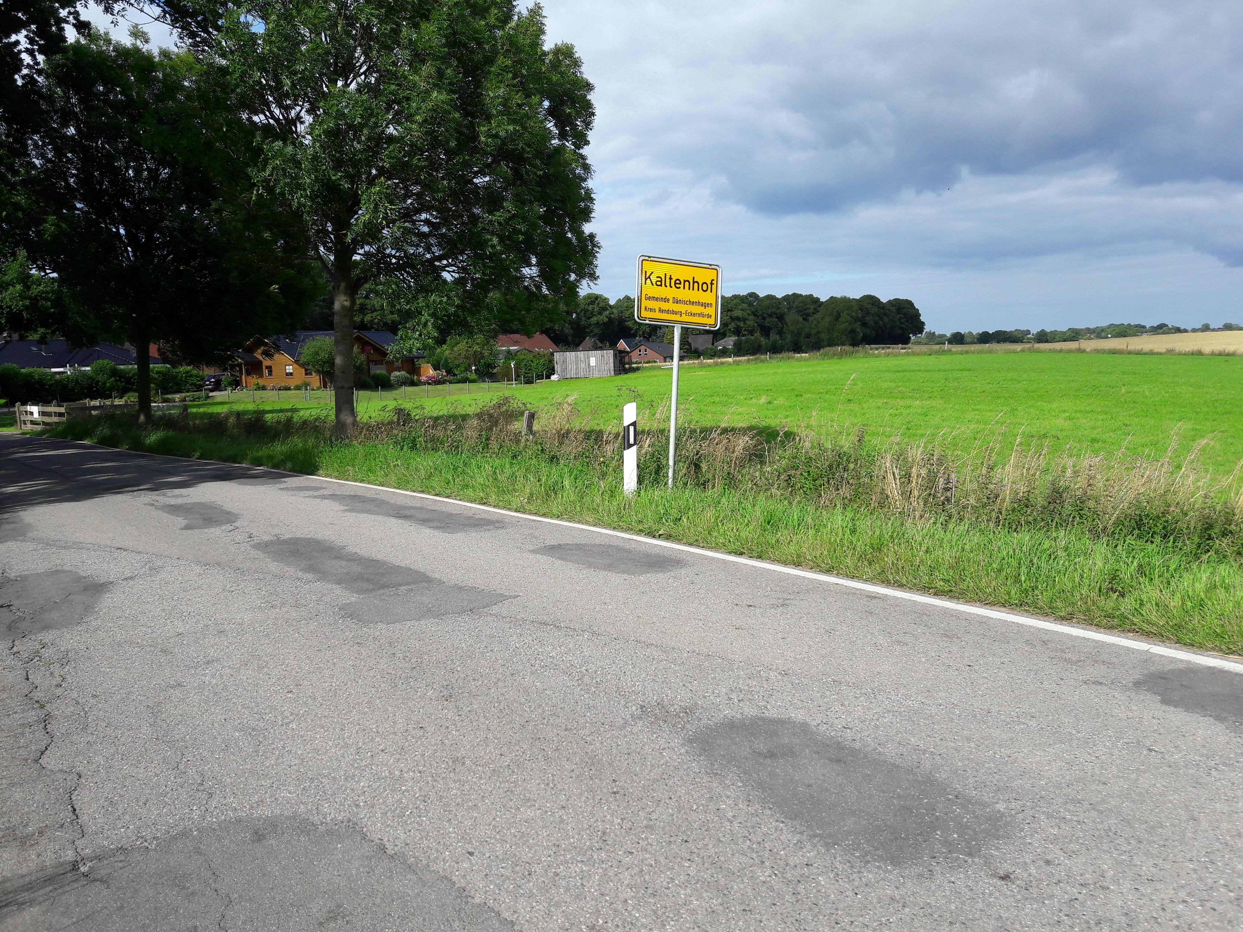 Ortsteil Kaltenhof von Dänischenhagen